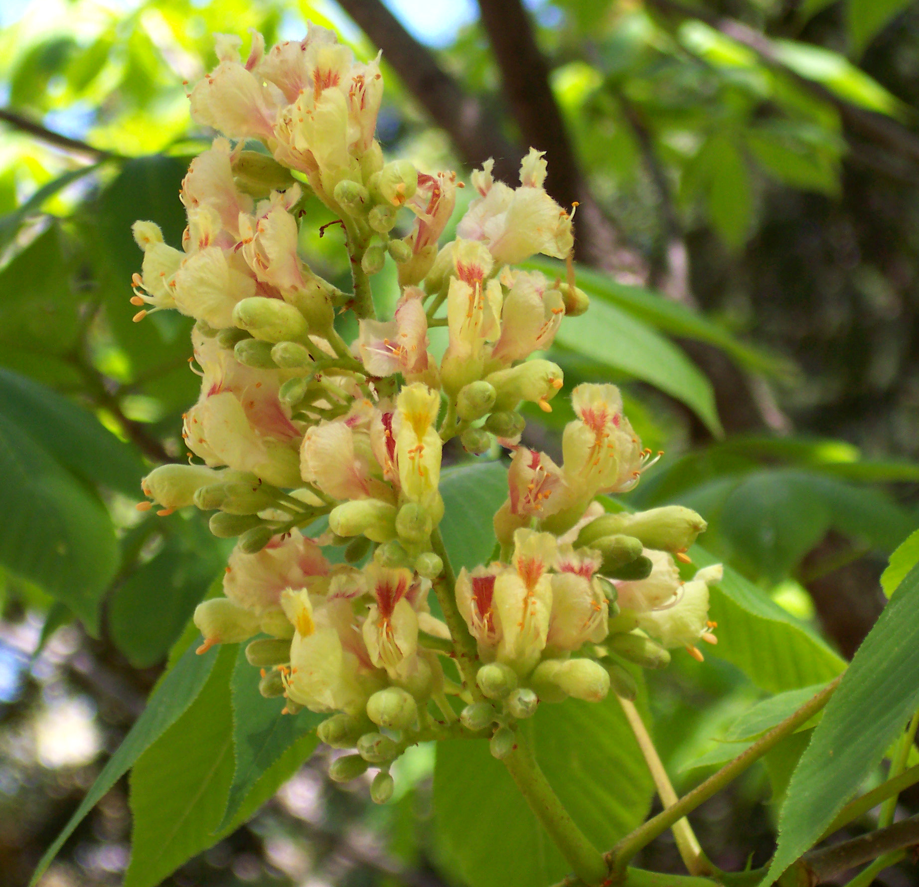 Aesculus flava. Real Jardín Botánico, Madrid.